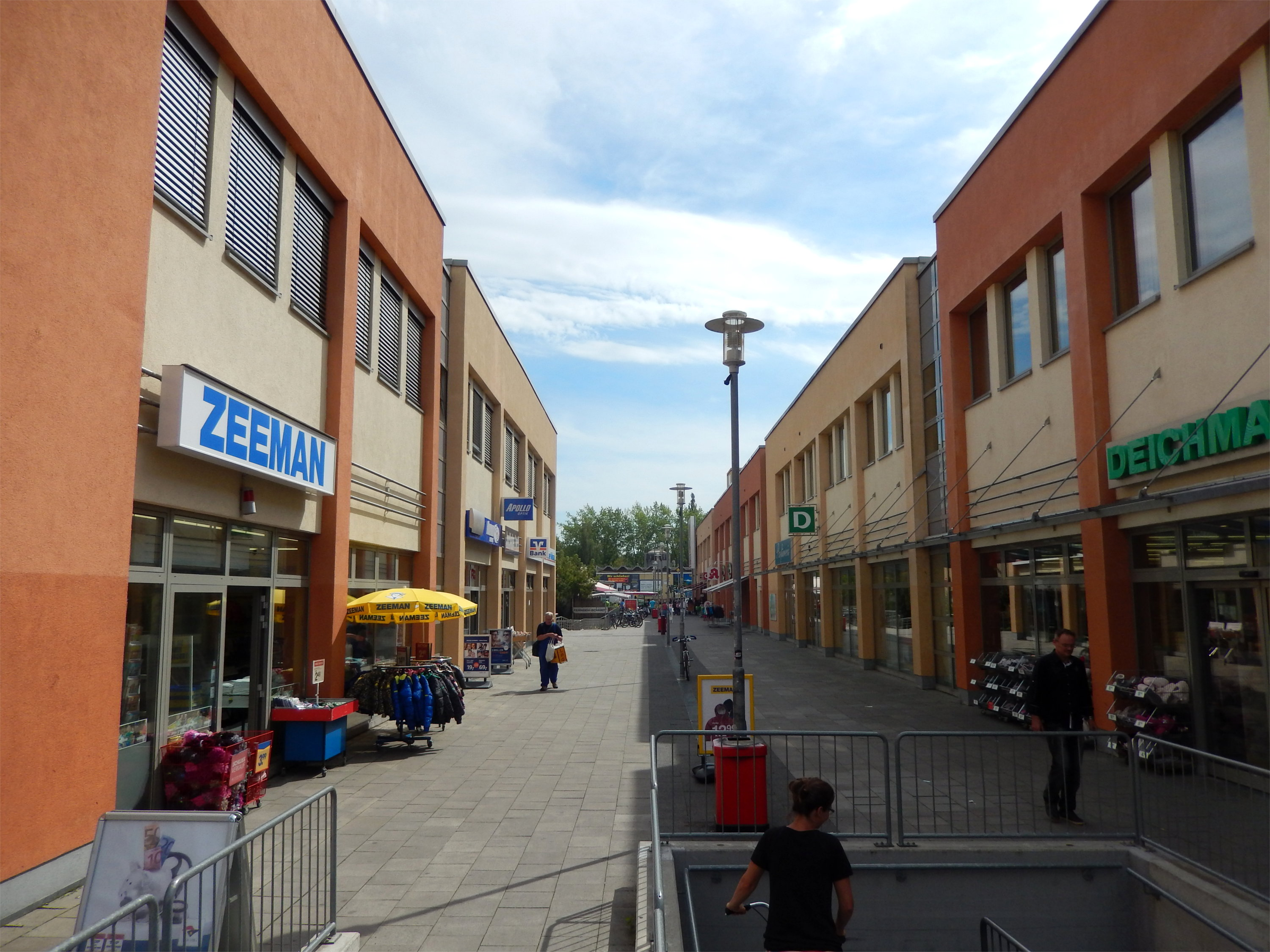 Geschäftsstraße Schlossparkpassage II in Berlin-Buch, erbaut 2007/08